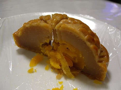 Lotus seed paste moon cake filling